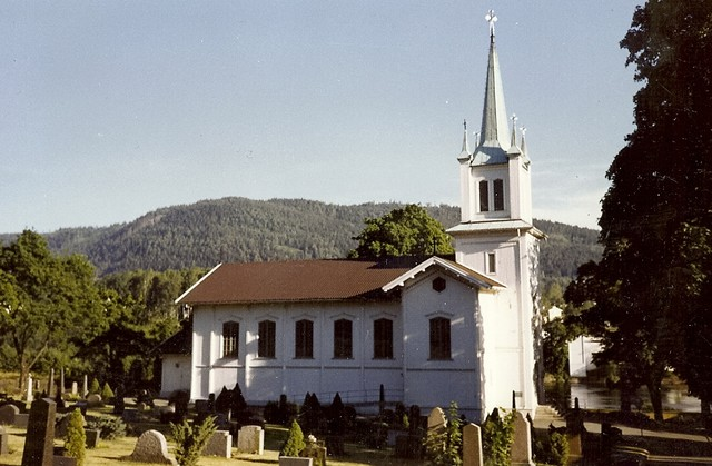 Nedre Eiker kirke